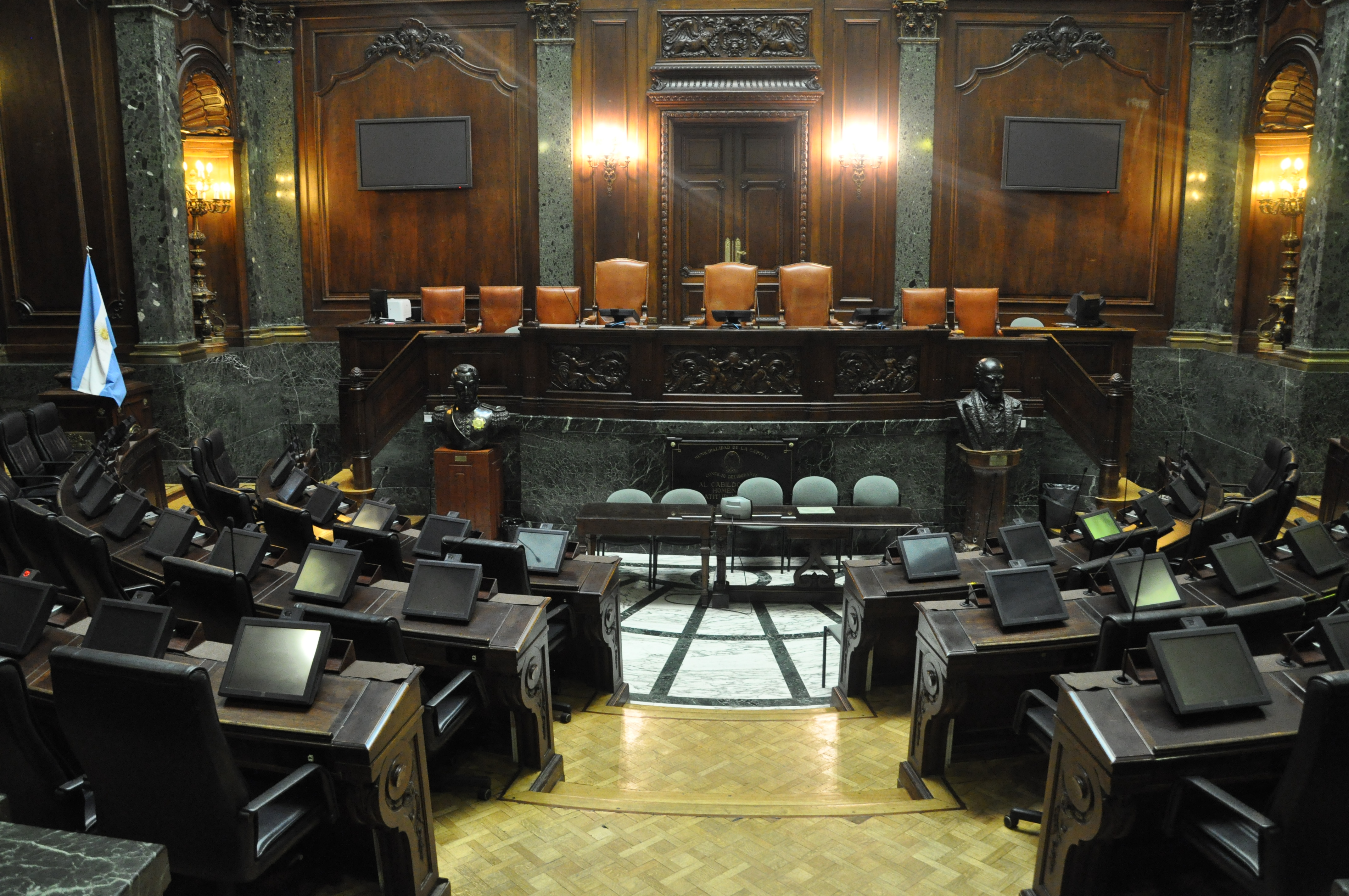 Recinto de Sesiones del Palacio de la Legislatura de la Ciudad de Buenos Aires